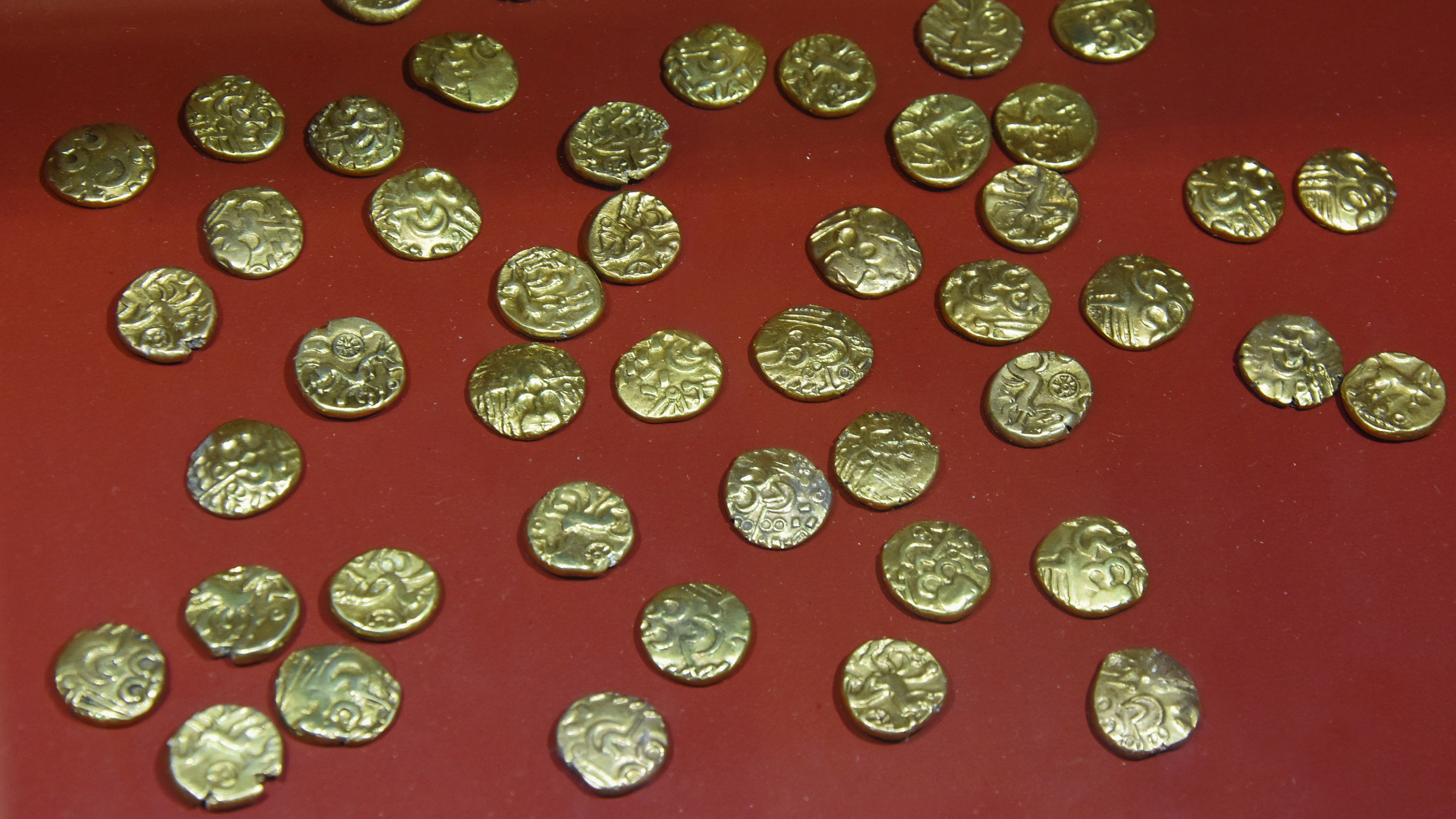 Gallische muntschat uit Thuin KMKG Brussel 18-12-2018